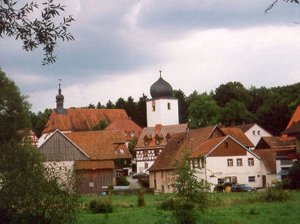 Ansicht Markt Heiligenstadt in Oberfranken mit evangelischer Kirche im Landkreis Bamberg